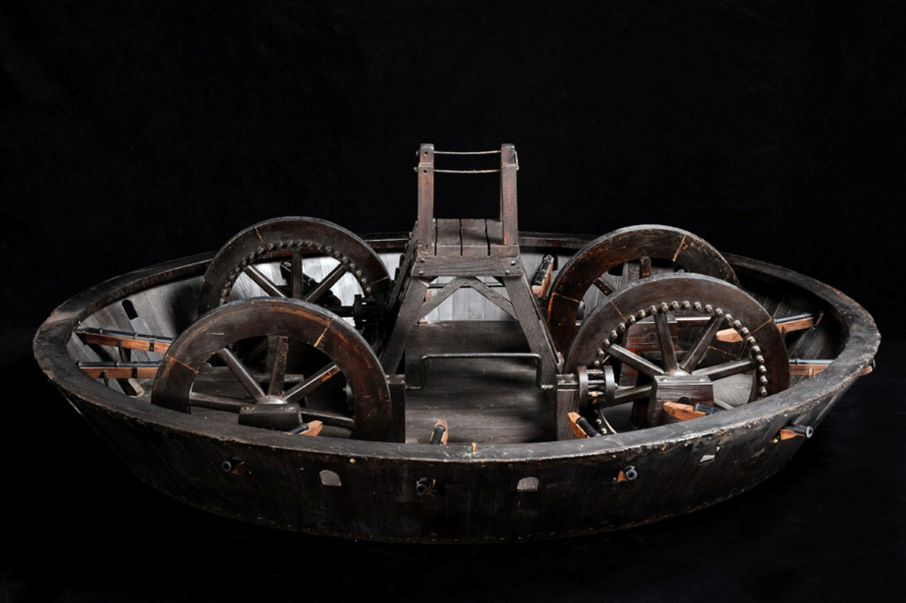 Il modello rappresenta un carro armato a forma di testuggine, rinforzato con piastre metalliche e aperto da un lato per poter vedere l'interno. È sormontato da una torretta interna di avvistamento e armato di cannoni. Il movimento del carro è garantito da otto uomini che azionavano dall'interno un sistema di ingranaggi collegato alle quattro ruote Funzione Il carro è pensato per portare panico e distruzione tra i nemici Modalità d'uso La direzione del fuoco poteva essere decisa dagli uomini posti nella parte alta del carro, da dove, attraverso delle strette fessure, potevano vedere il campo di battaglia.